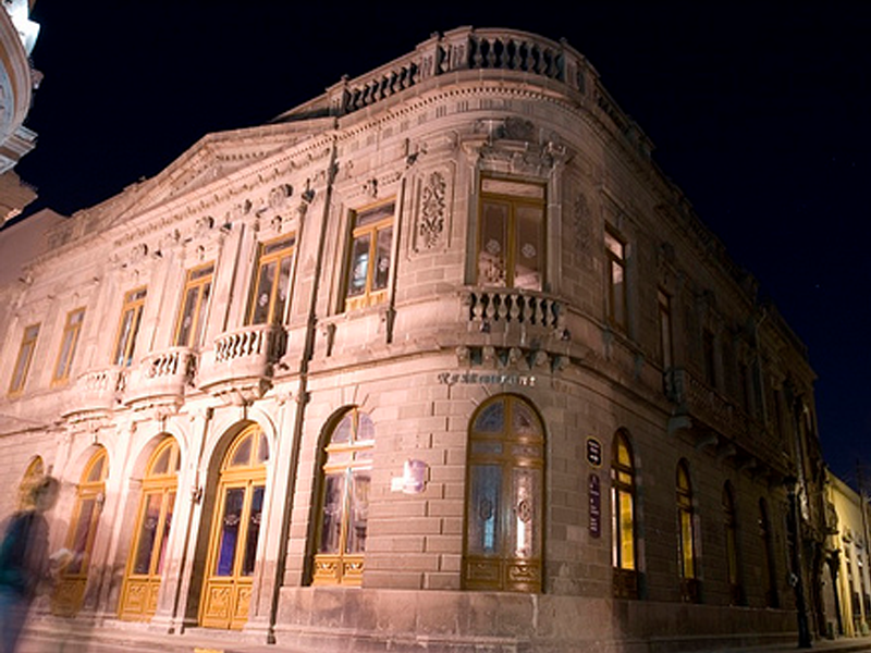 Exterior de la Sociedad Potosina La Lonja, en el centro histórico de la ciudad de San Luis Potosí, México